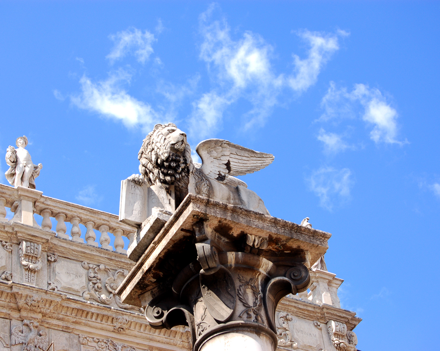 Il leone di San Marco in Piazza Erbe a Verona, ricostruito nel 1886 al posto di quello, originale, abbattuto dai giacobini.